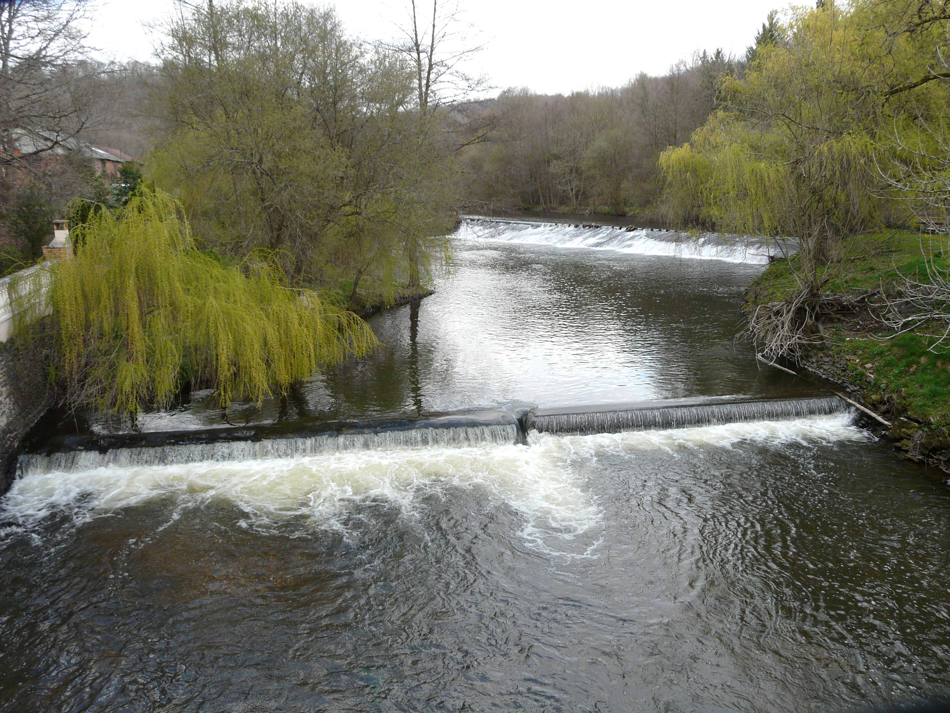 Rivière l'Isle aux pont des Castilloux, en limite de Nantheuil (à gauche) et Nanthiat (à droite), Dordogne, France.